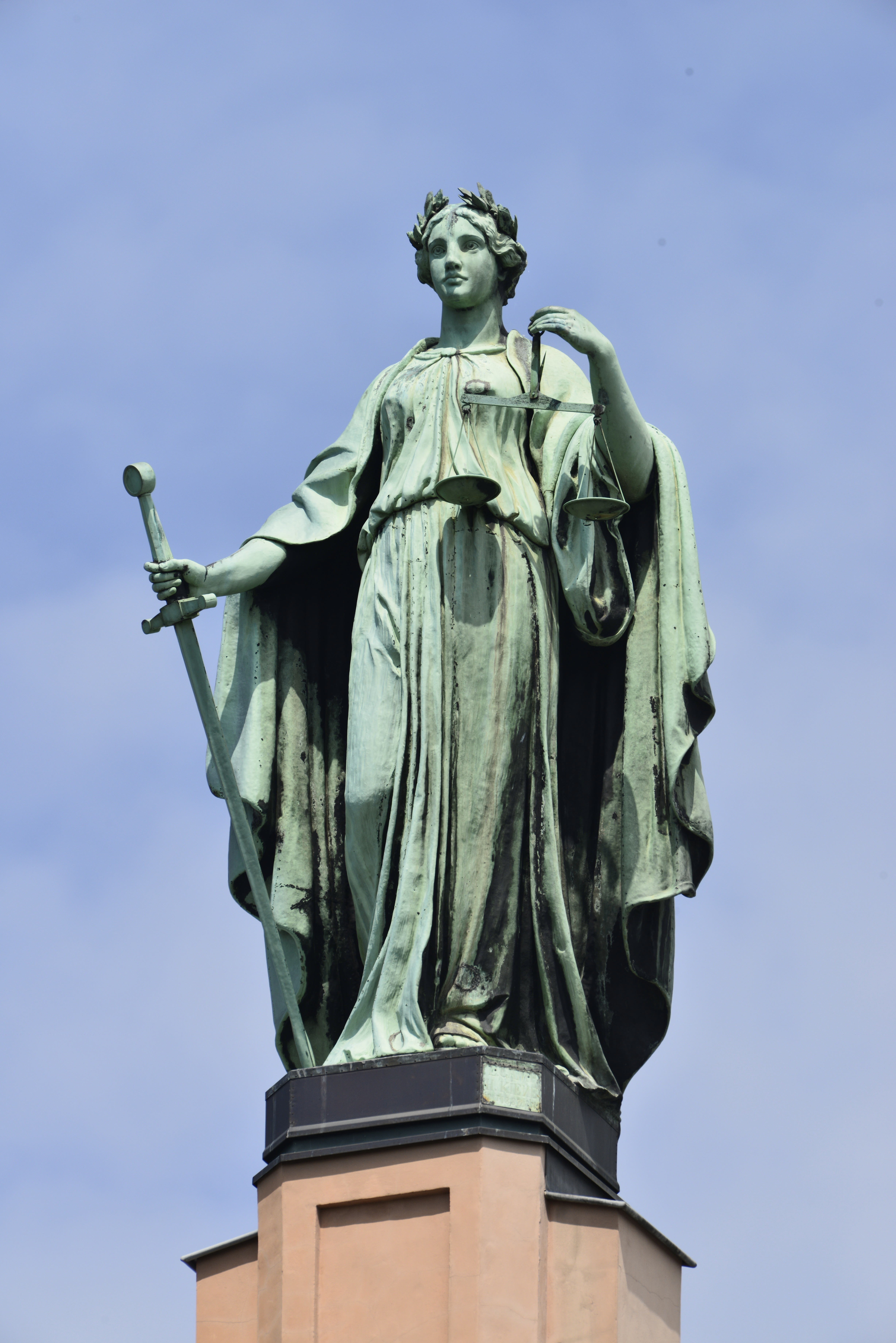 München, Maximilianstraße, Figur an der Giebelfassade der Regierung von Oberbayern. Die Justizia. Eehdem von Halbig erfundene Figur wird im Jahr 1897 durch den Bildhauer Ludwig Gamp neu geformt. Der Kumpferschmied Hygien Kiene trieb die Figur aus Kupferblechen. (Aufschrift am Sockel)